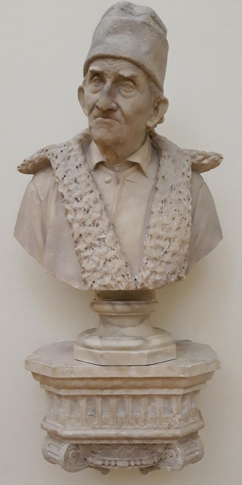 Busto di Girolamo dai Libri